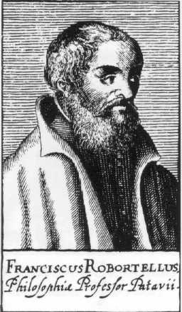 Francesco Robortello (1516-1567), umanista italiano, incisione